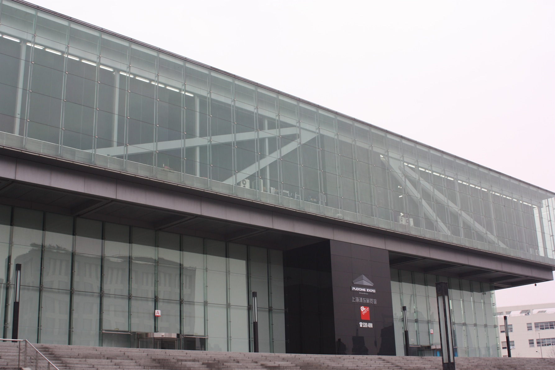 上海浦东展览馆 2013-1-5